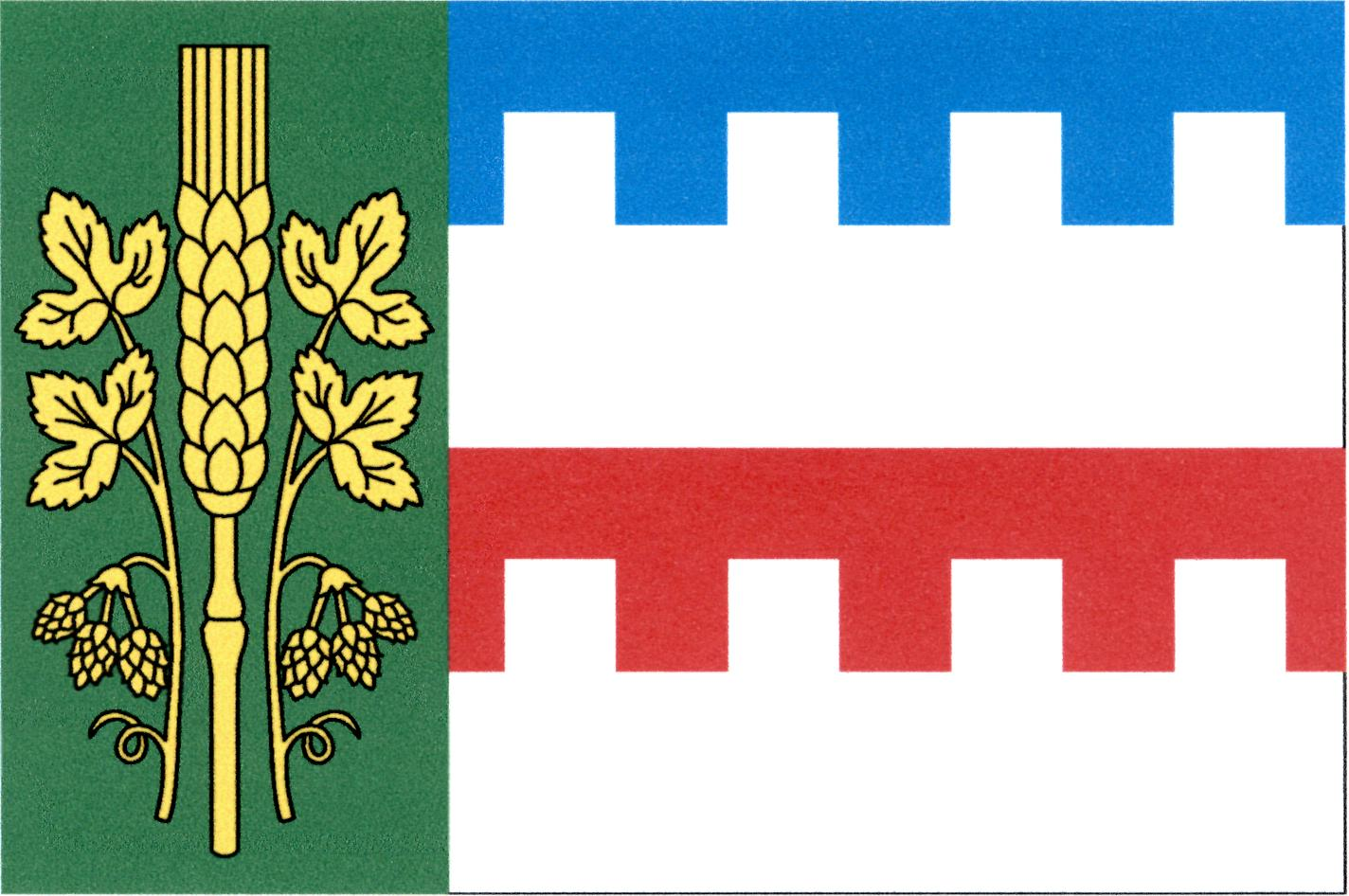 Vlajka obce Zbrašín